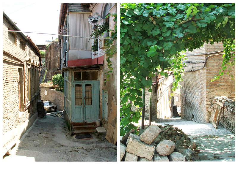 თბილისი / Tbilisi